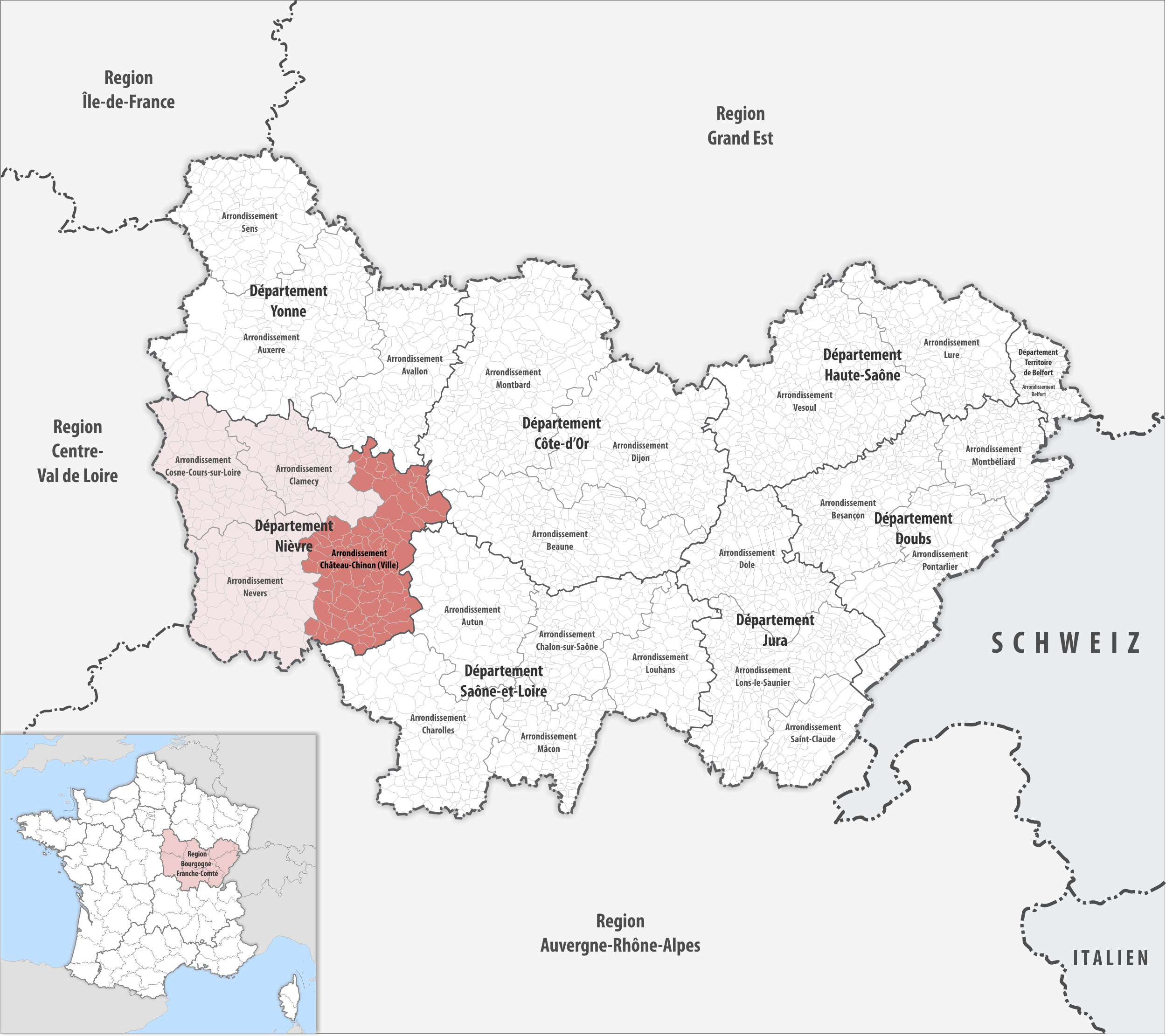 Lage des Arrondissements Château-Chinon (Ville)